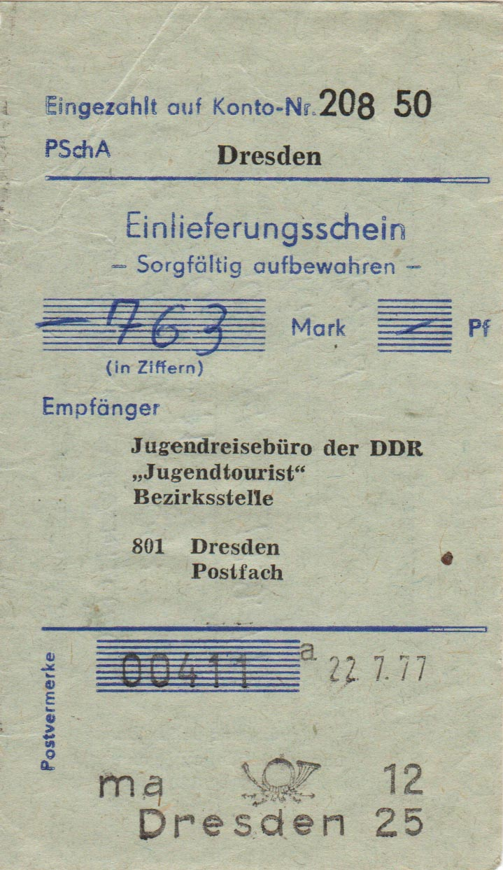 Bezahlquittungsabschnitt über 763 M vom Postscheckamt Dresden für eine Jugendtouristreise im Jahr 1977